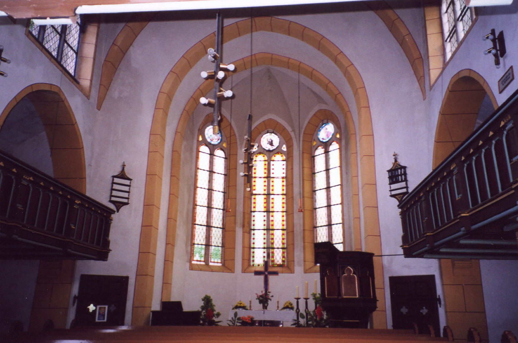 Peter- und Paul-Kirche in Frankenheim/Rhön von 1885/1886.